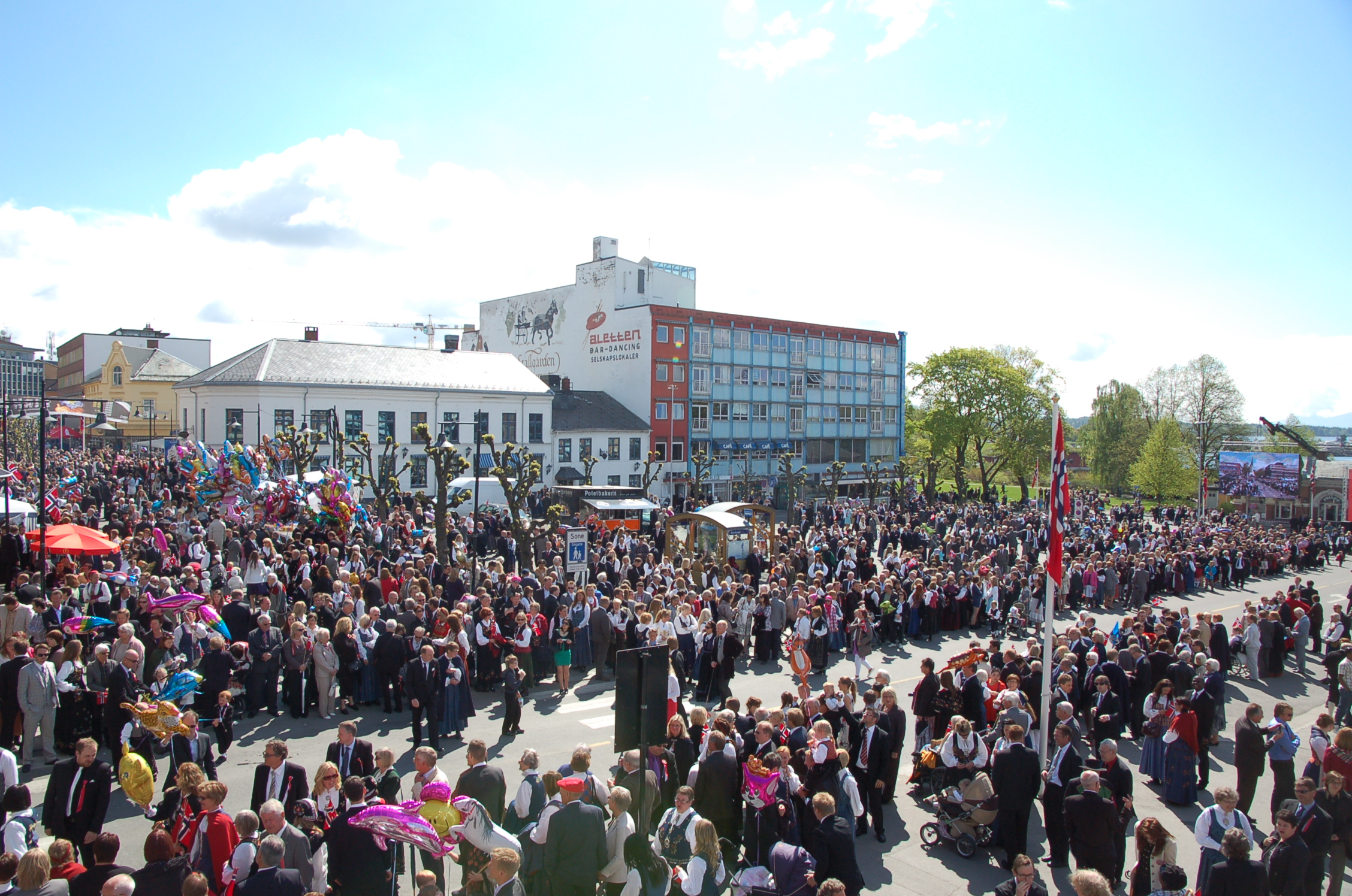 Stortorget, Hamar